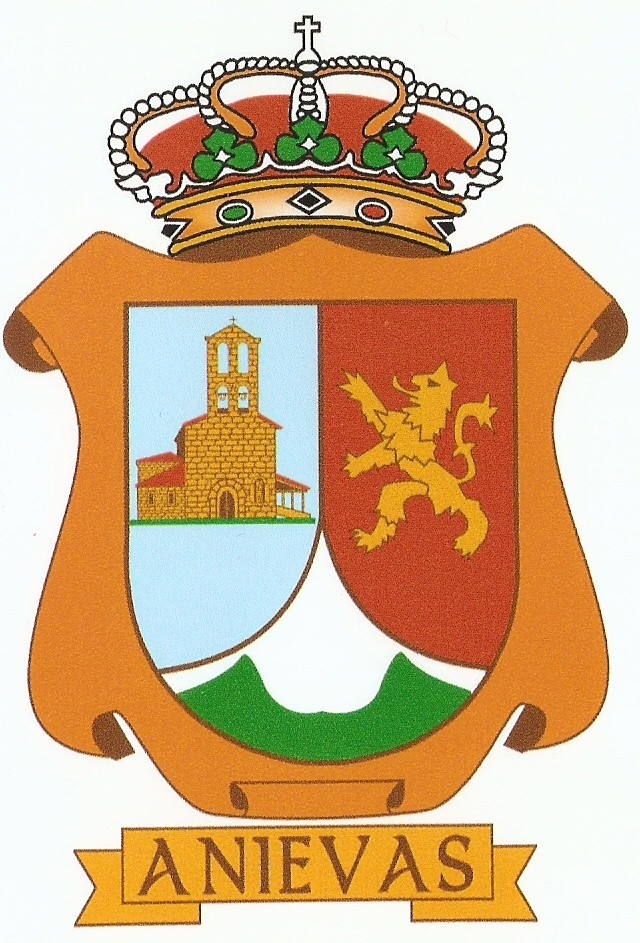 escudo del municipio de Anievas